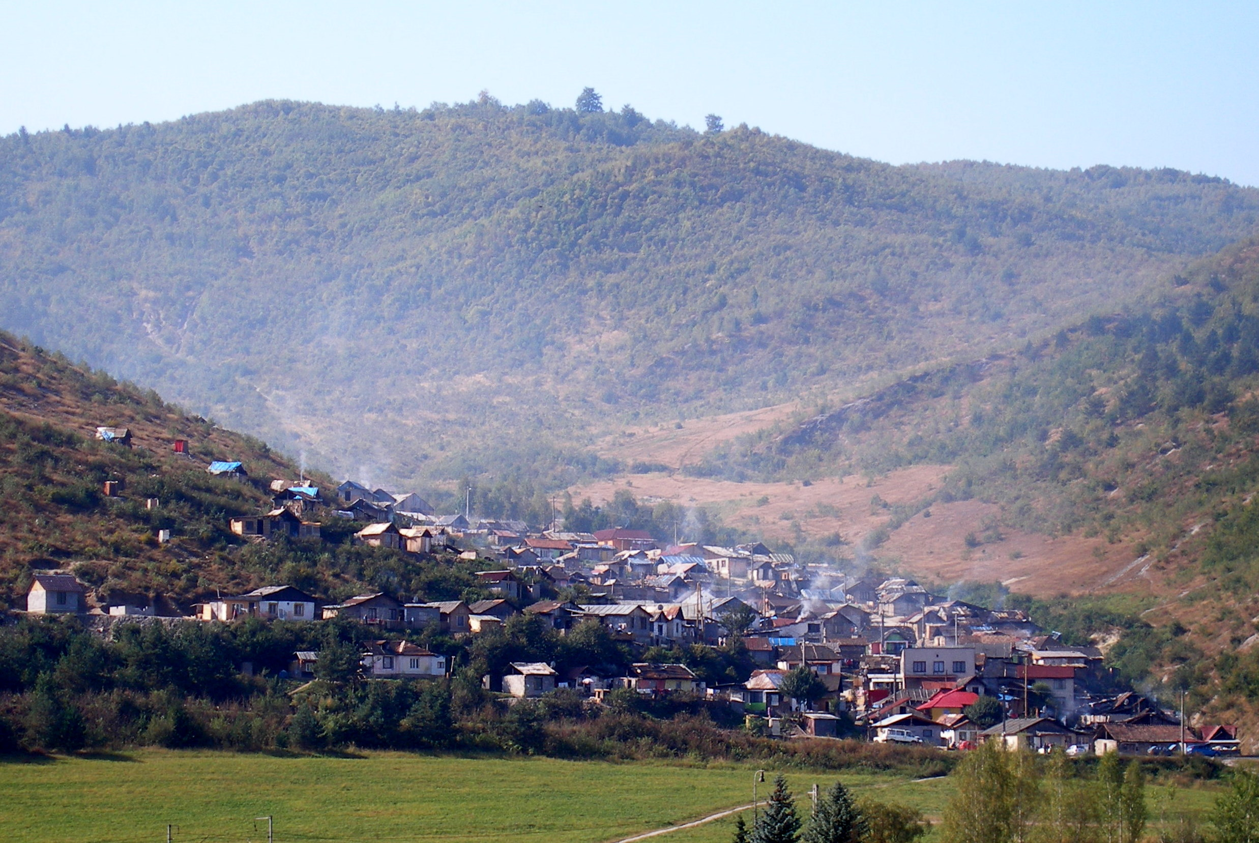 Rómska osada pri obci Richnava. Okres Gelnica.